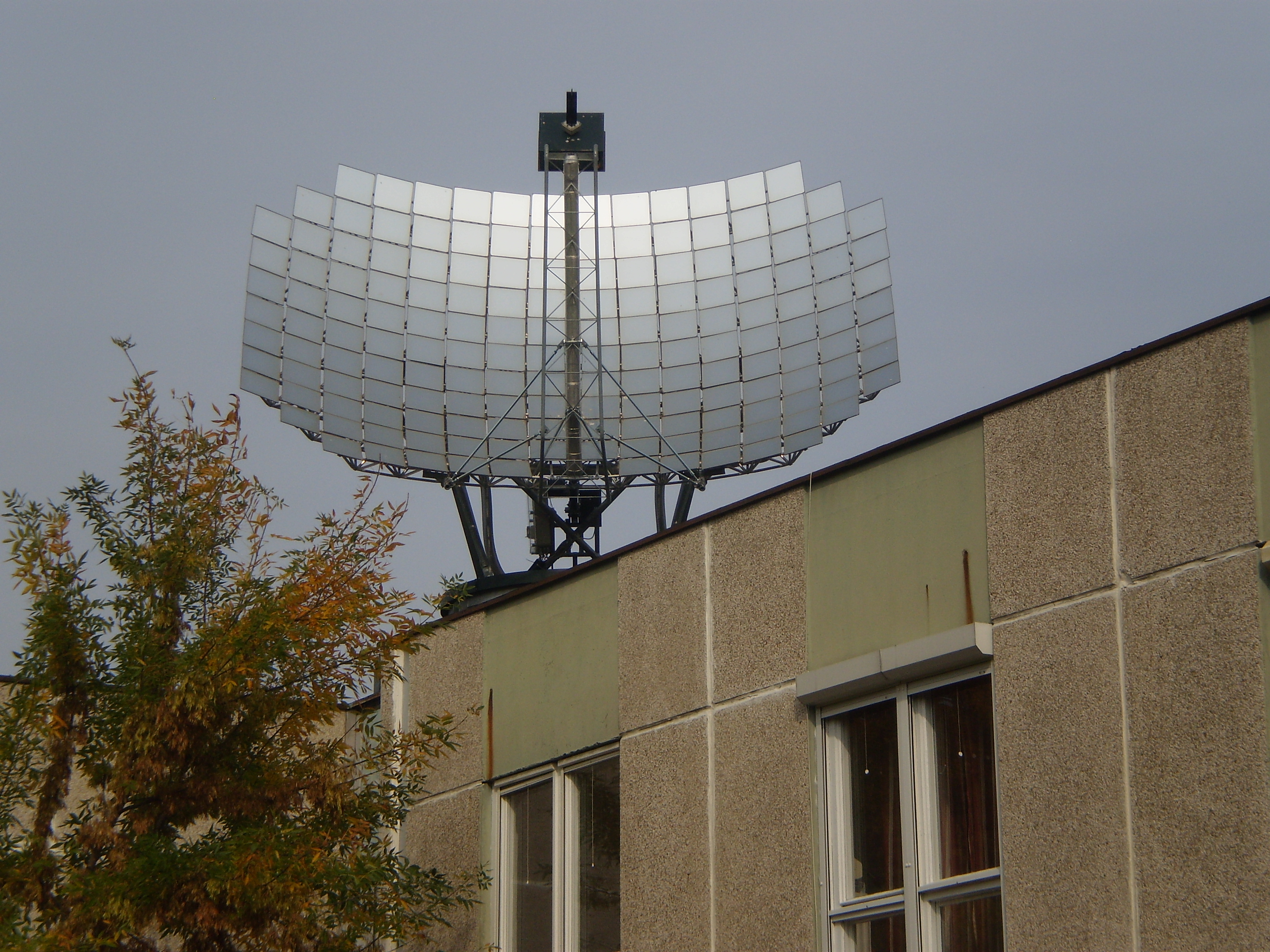 Szolár parabola meleg víz előállításra egy békásmegyeri nyugdíjas ház tetején.